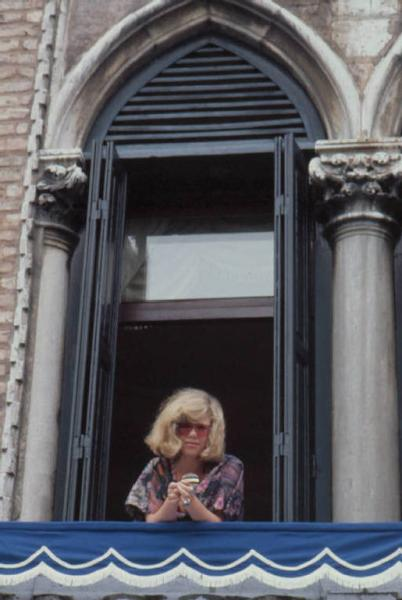 Erica Jong fotografata a Venezia negli anni '70